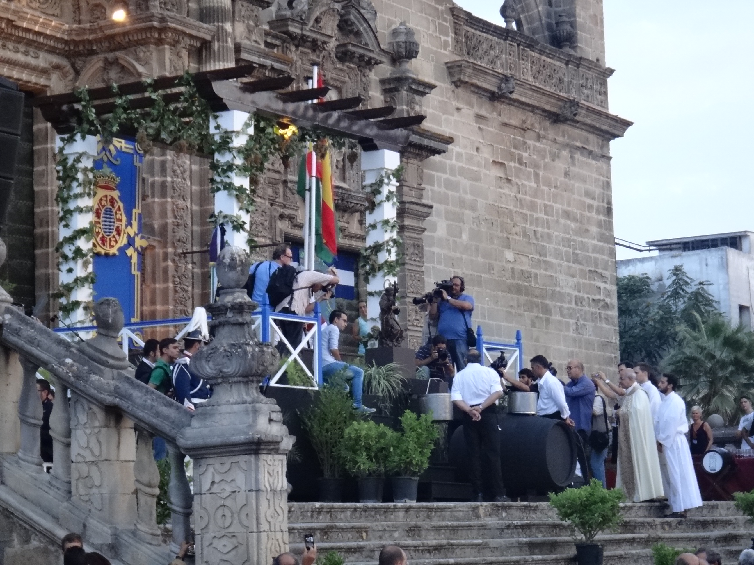 Catedral de Jerez de la Frontera en la Feria de la Vendimia 2015